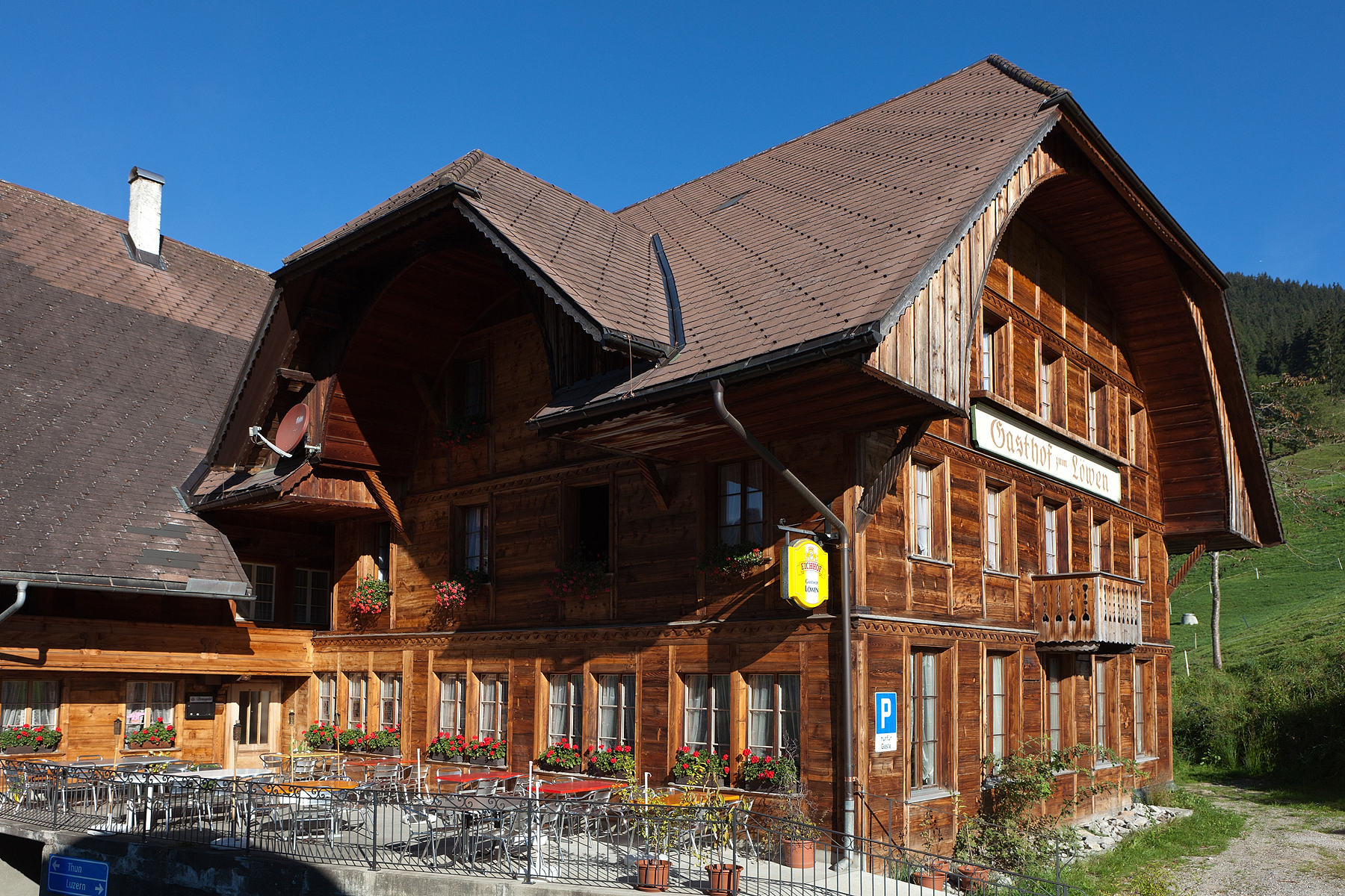 Gasthof Löwen in Schangnau im Emmental (BE)